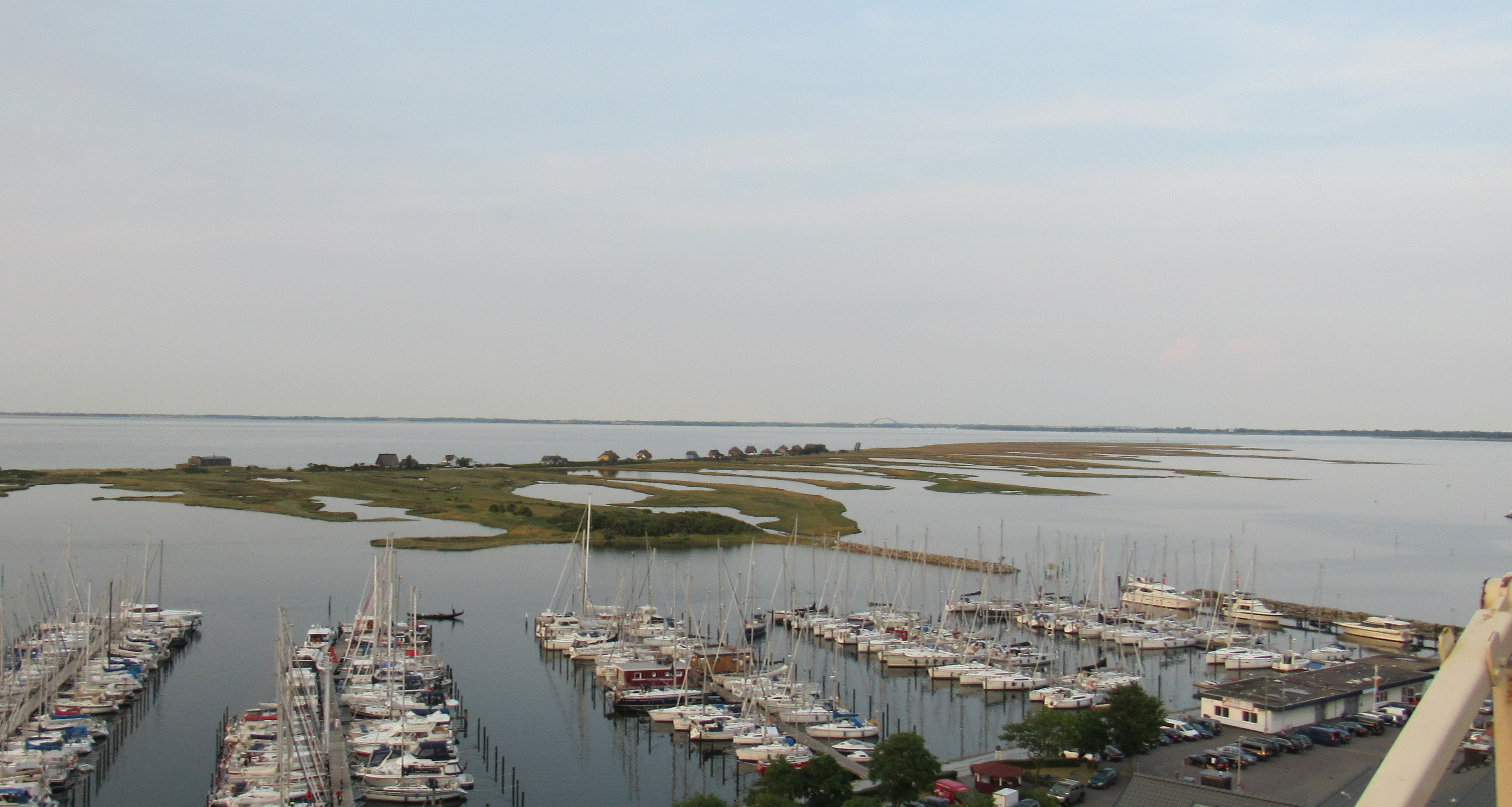 Yachthafen Heiligenhafen, Blick zum Graswarder mit dem Naturschutzgebiet „Graswarder/Heiligenhafen“